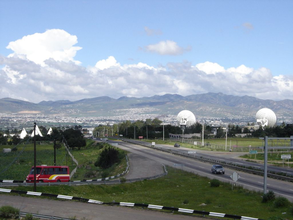 Vista del Valle de Tulancingo donde se Observa las Antenas de Telecomunicacion Via Satelite.